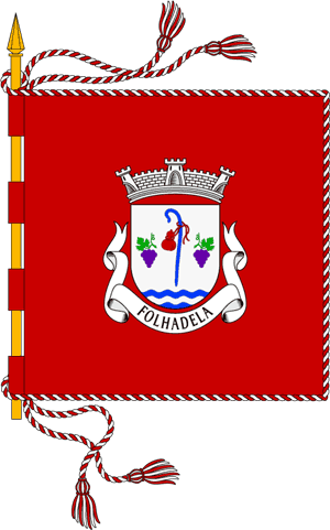 Estandarte da freguesia de Folhadela (concelho de Vila Real)